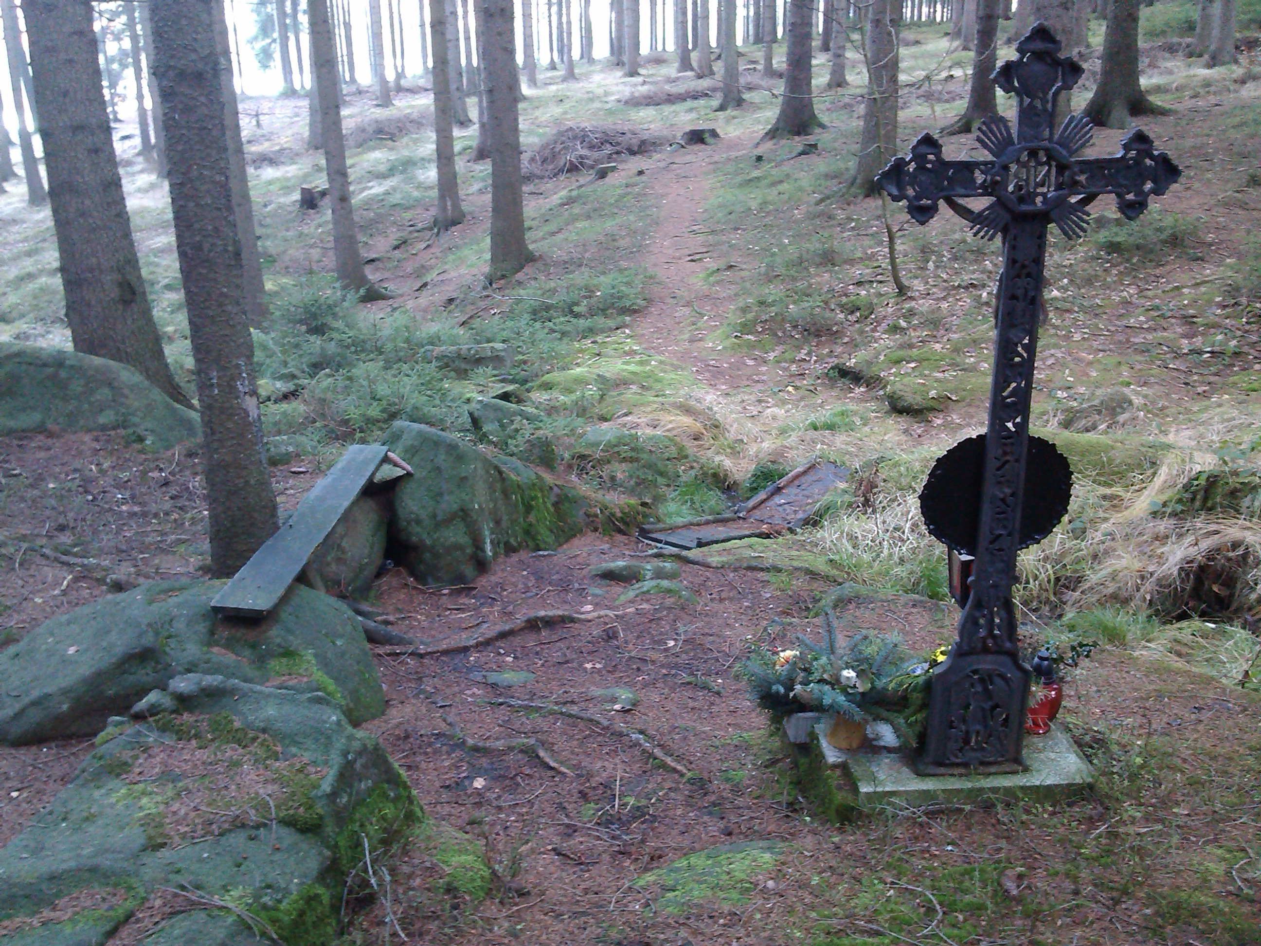 křížek v údolí